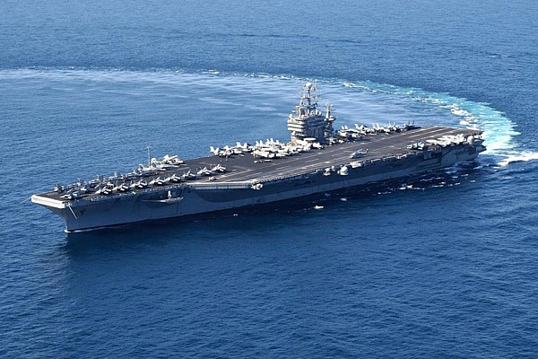 Official US Navy Photograph